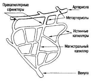 Сосуды микроциркуляции